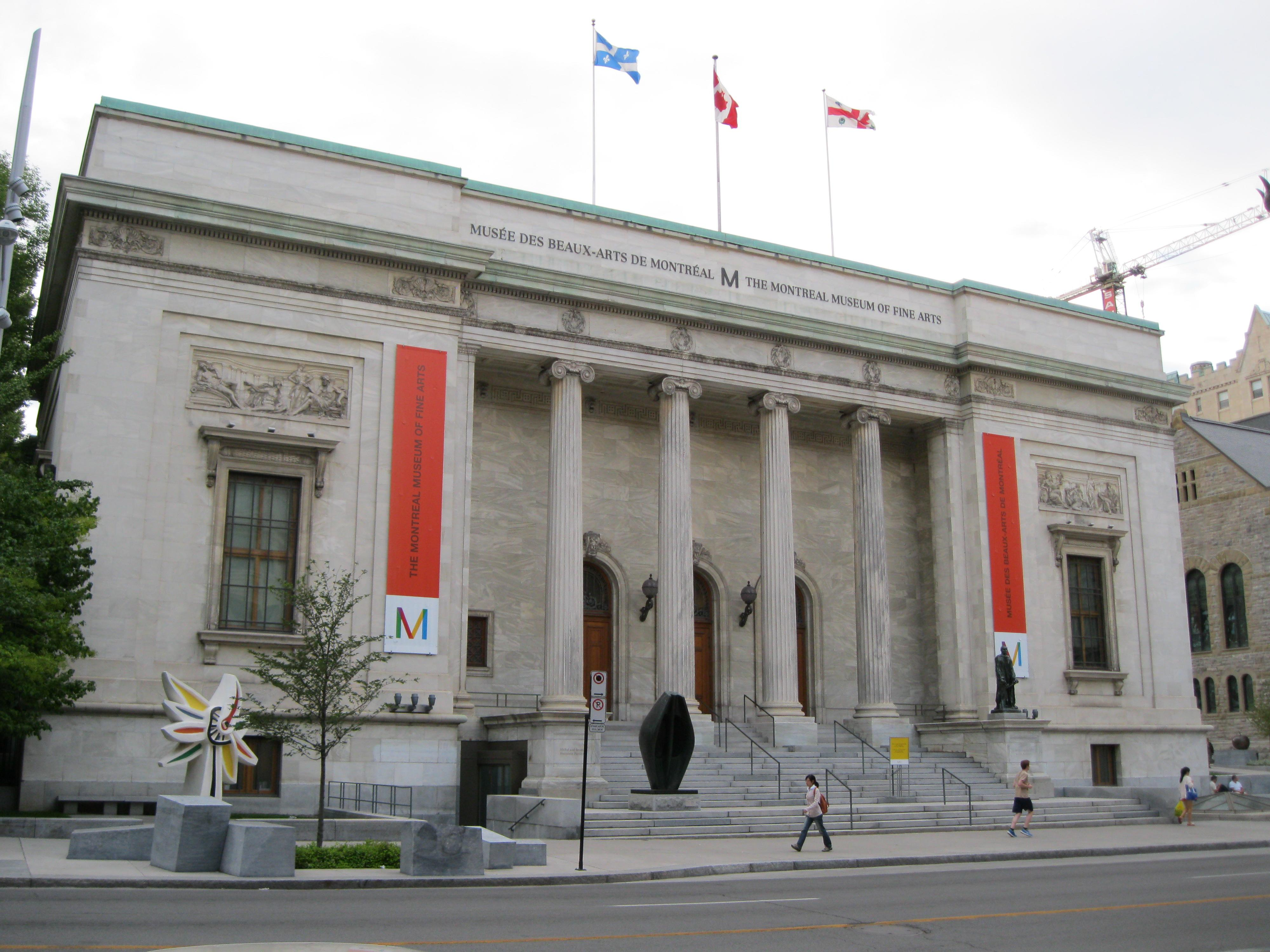 Musée des beaux-arts de Montréal